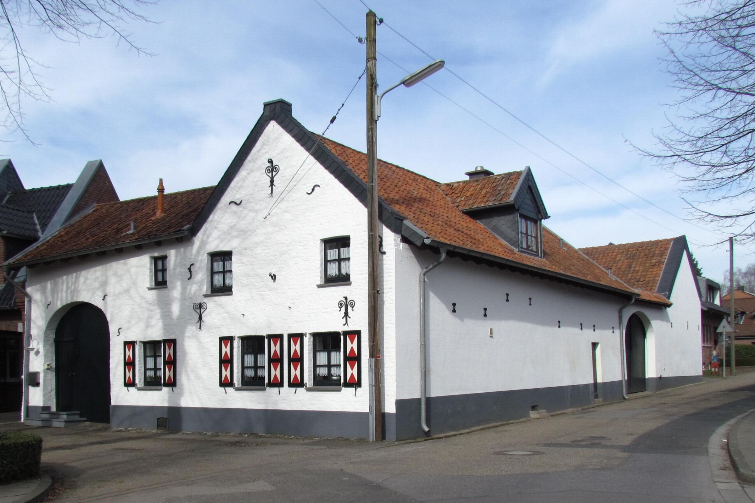 Historisches Gebäude in Hastenrath